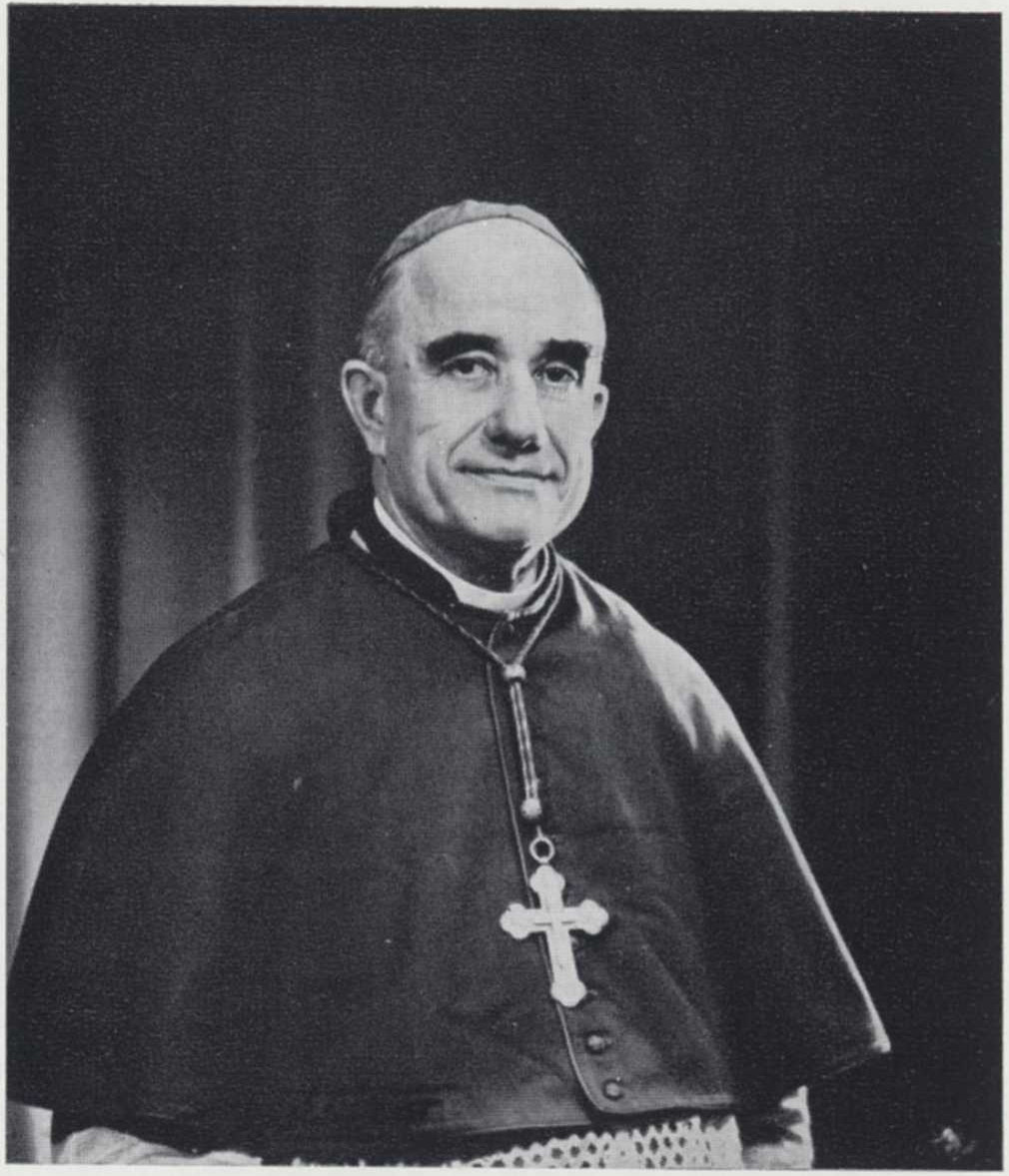 Né à Pouillon (Landes) le 13 juin 1897 Mort à Luçon (Vendée) le 1 juillet 1975) Evêque de Luçon de 1941 à 1967.